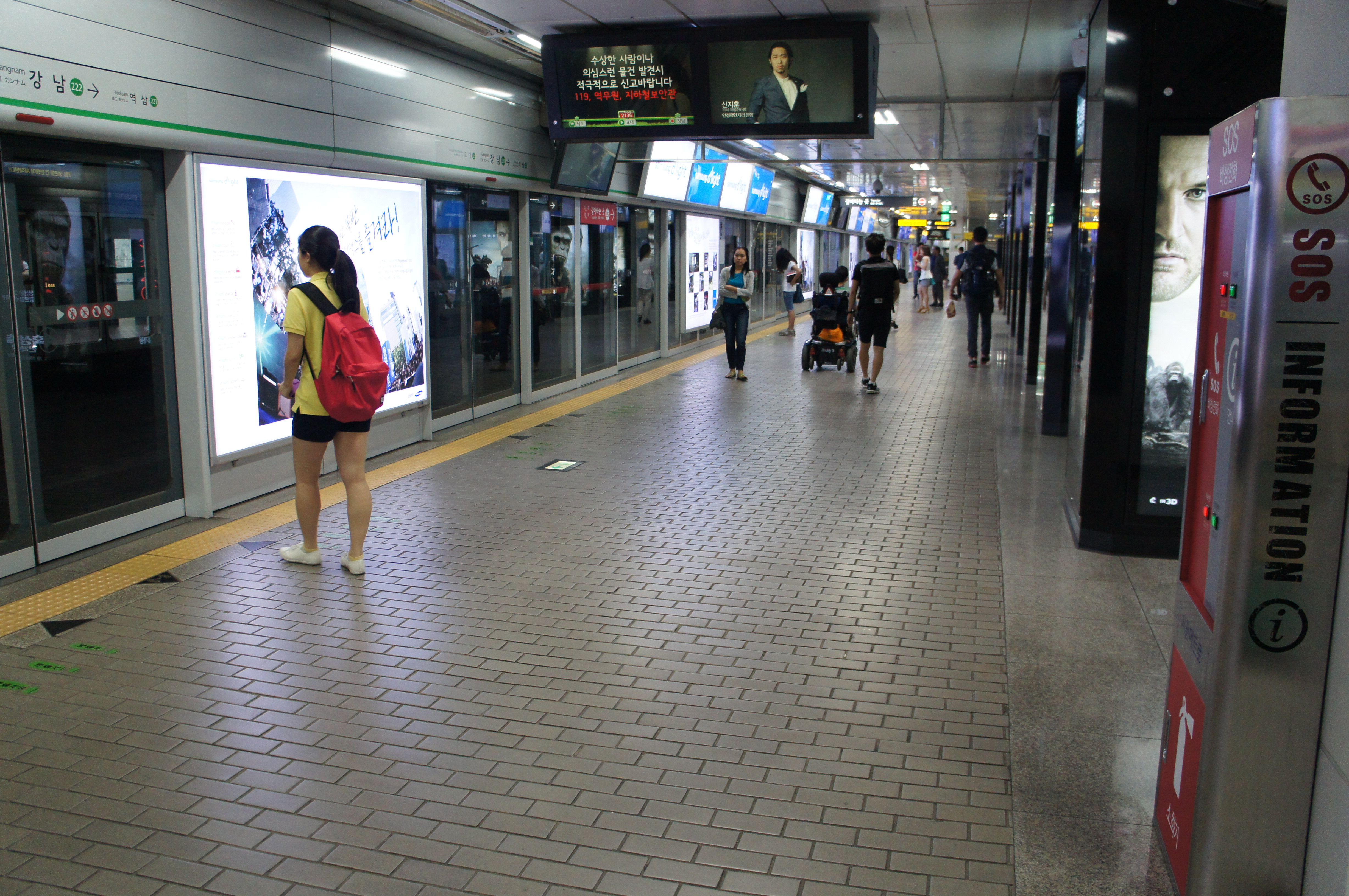 강남역 승강장